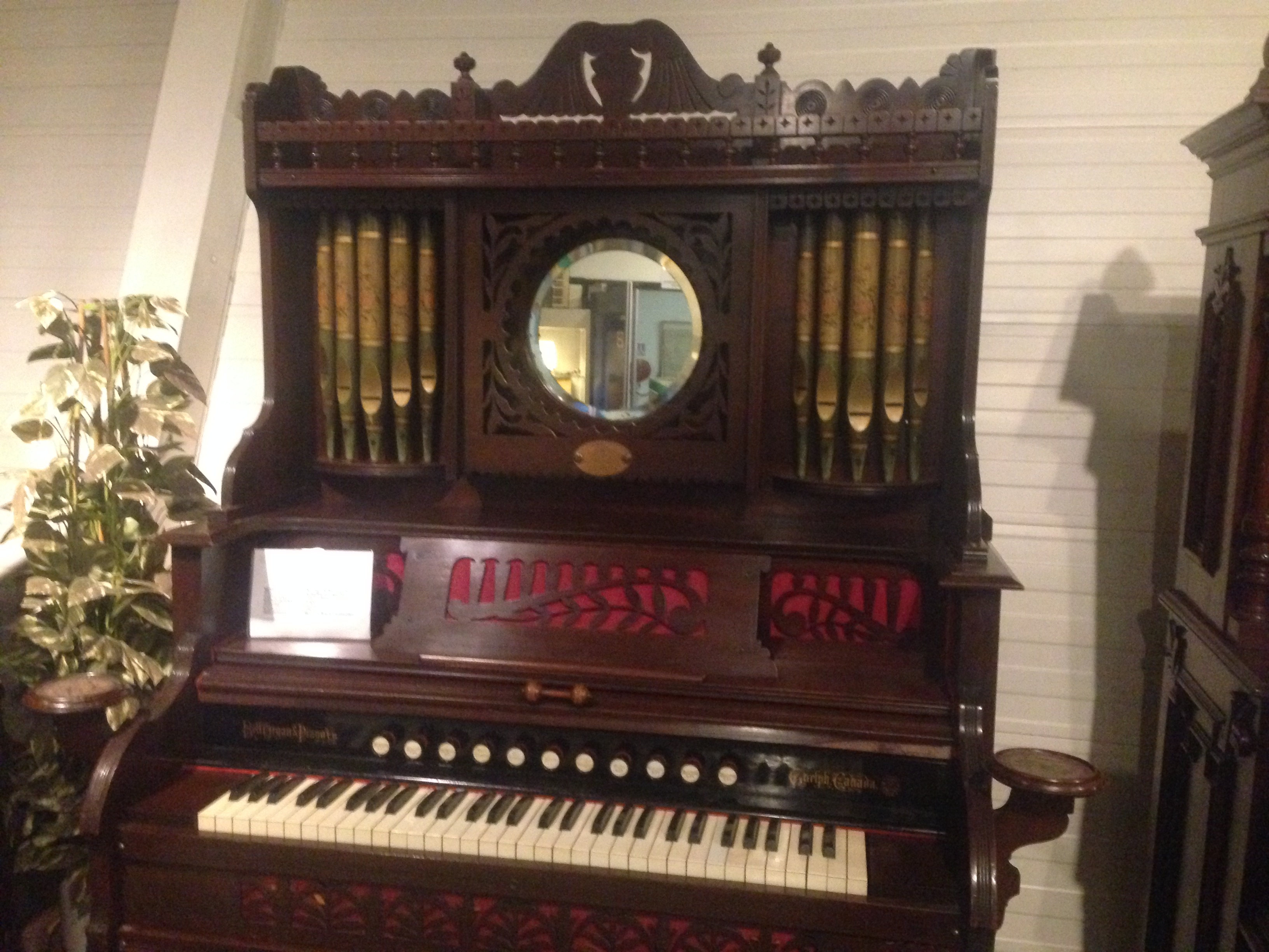 Harmonium Museum Nederland, Veenpark, Barger-Compascuum, Netherlands